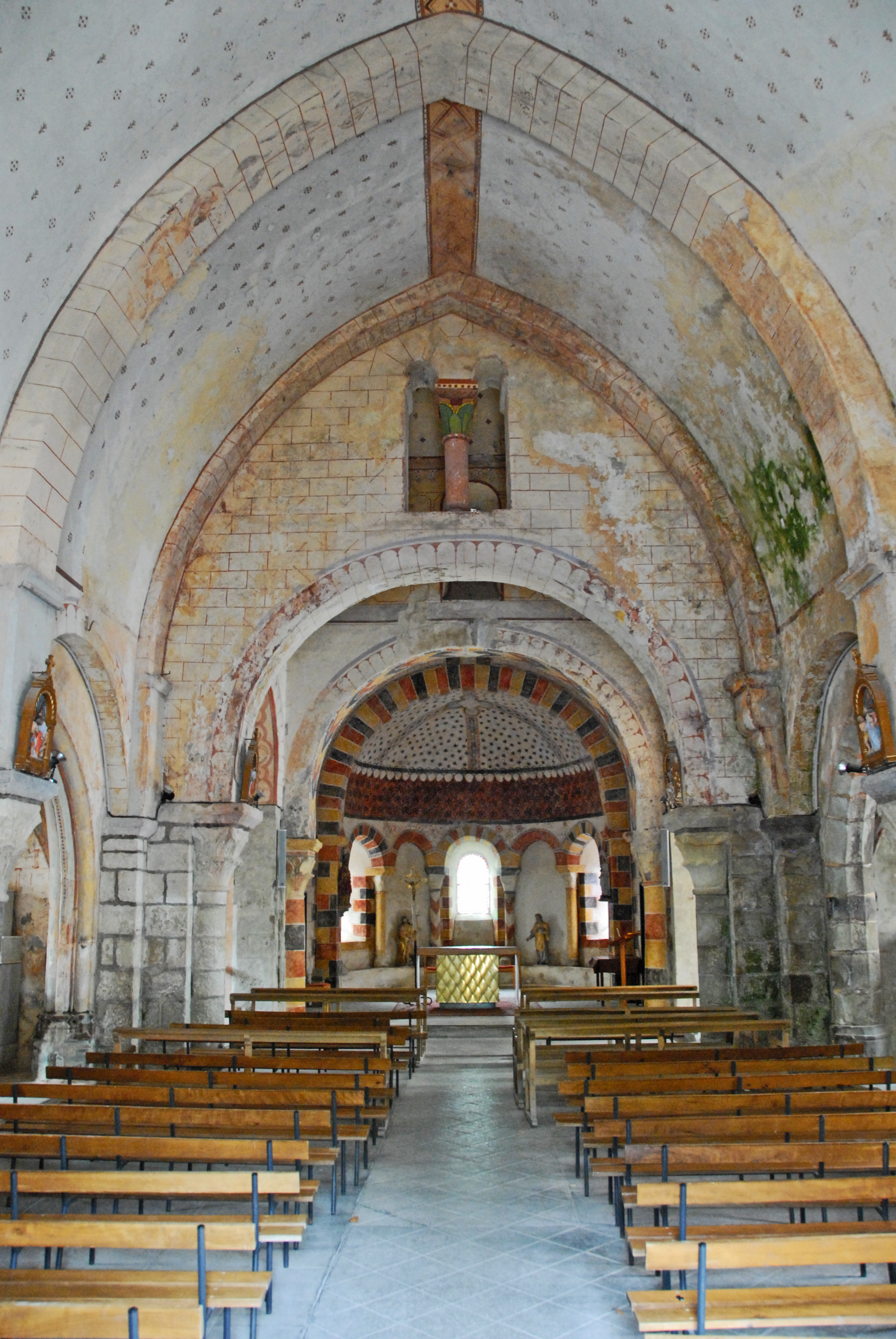 Dorfkirche Chambon-sur-Lac, Schiff z. Chor